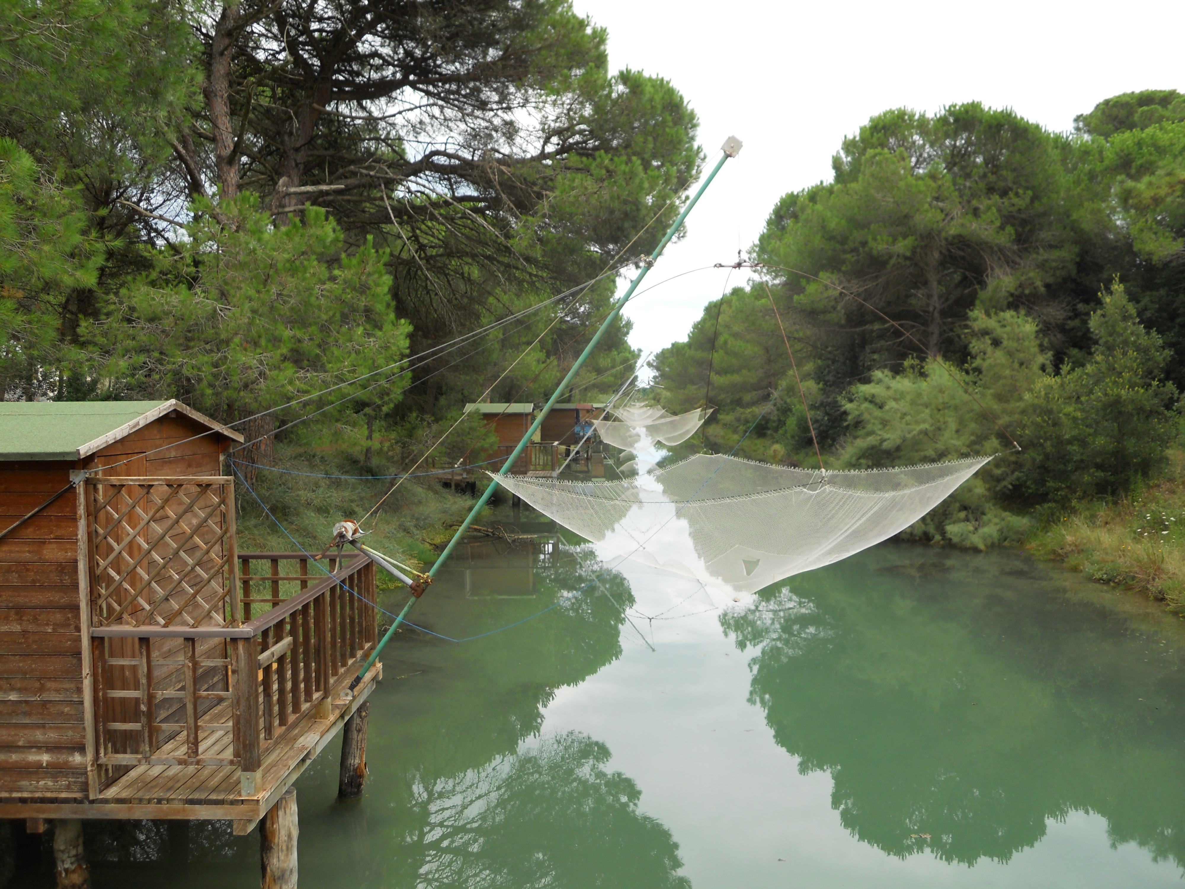 Canale e capanno di pesca all'interno della pineta